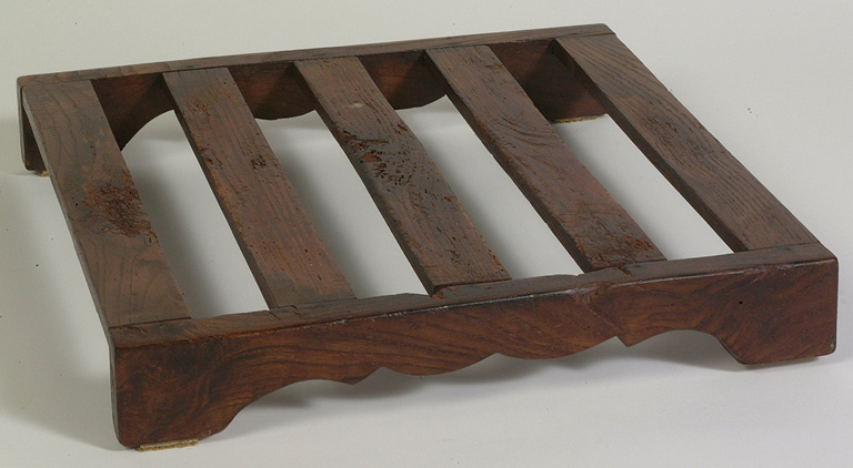 Claie de cinq traverses et deux montants, ces derniers formant deux pieds reliés par une forme en arabesque. Sous chacun des quatre pieds est collé un morceau de feutre.